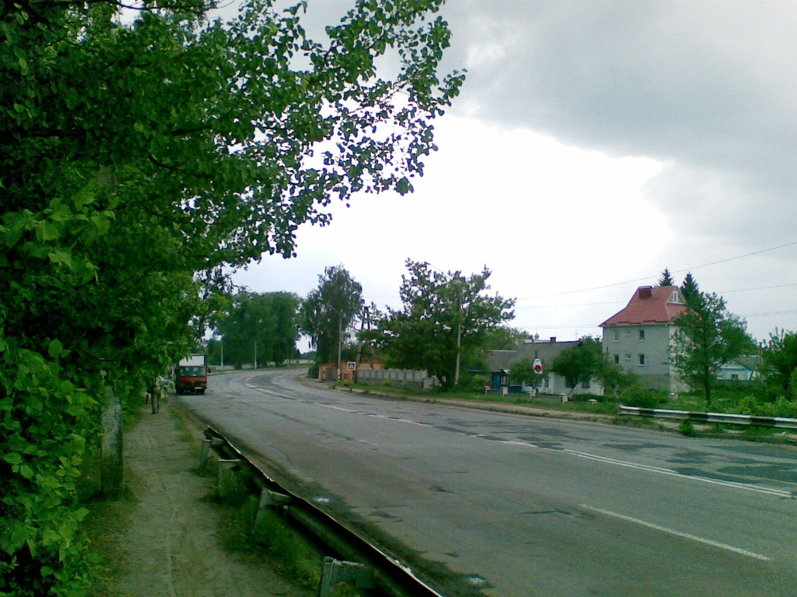 Автошлях Н 03 у селі Тетерівка Житомирського району Житомирської області